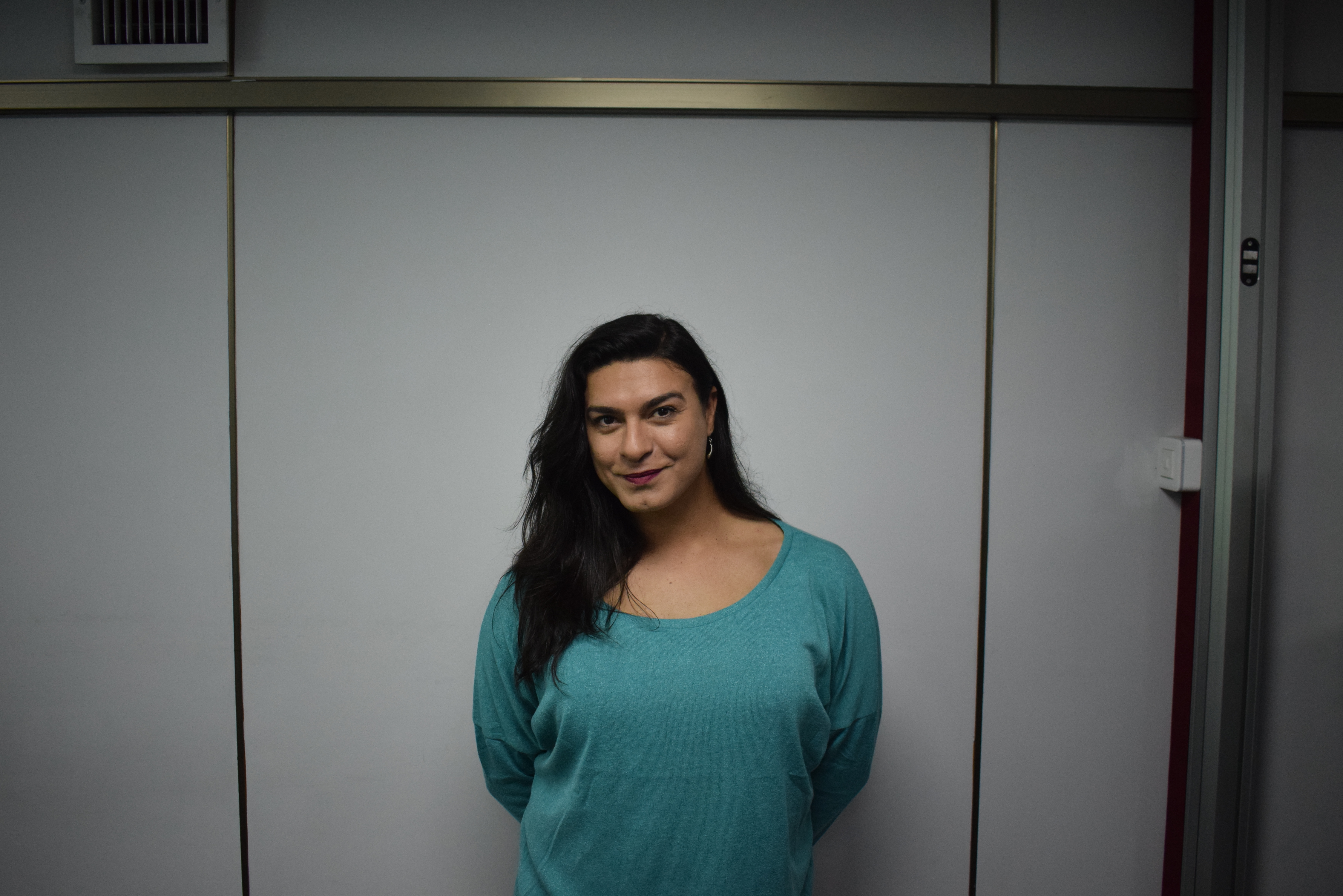 Josefina González en 2019